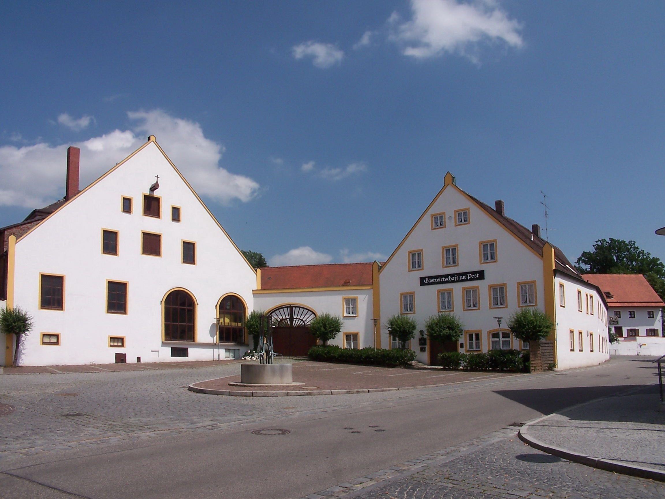 Bahnhofstraße 11. Gasthof Post, zweigeschossiger Satteldachbau mit Anbau, 2. Hälfte 17. Jh. und nach 1779; großer Hof mit Tordurchfahrt und Brauereigebäude, 19. Jh.